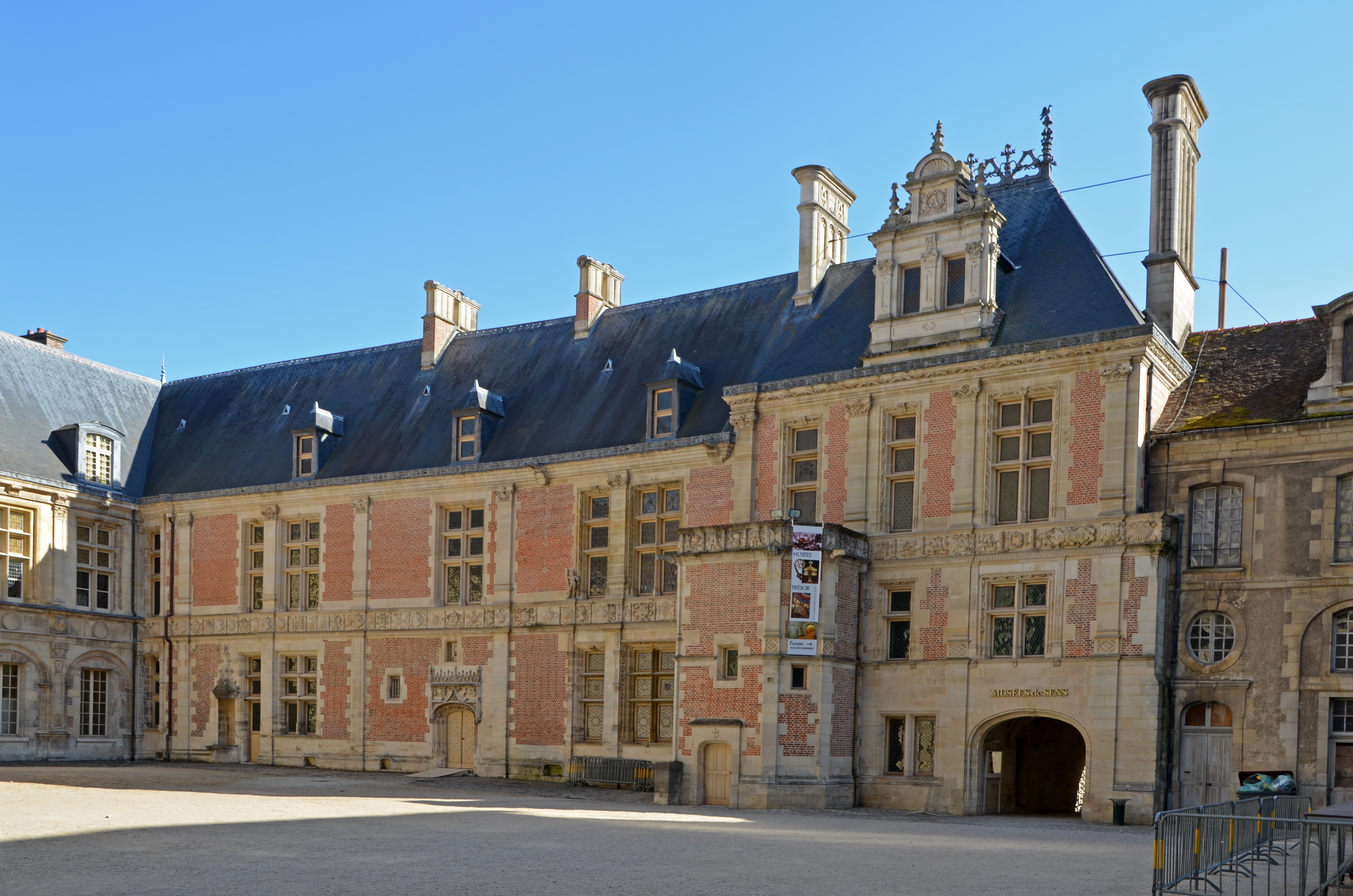 Ancien Palais des archevêques de Sens, Yonne, Bourgogne,France